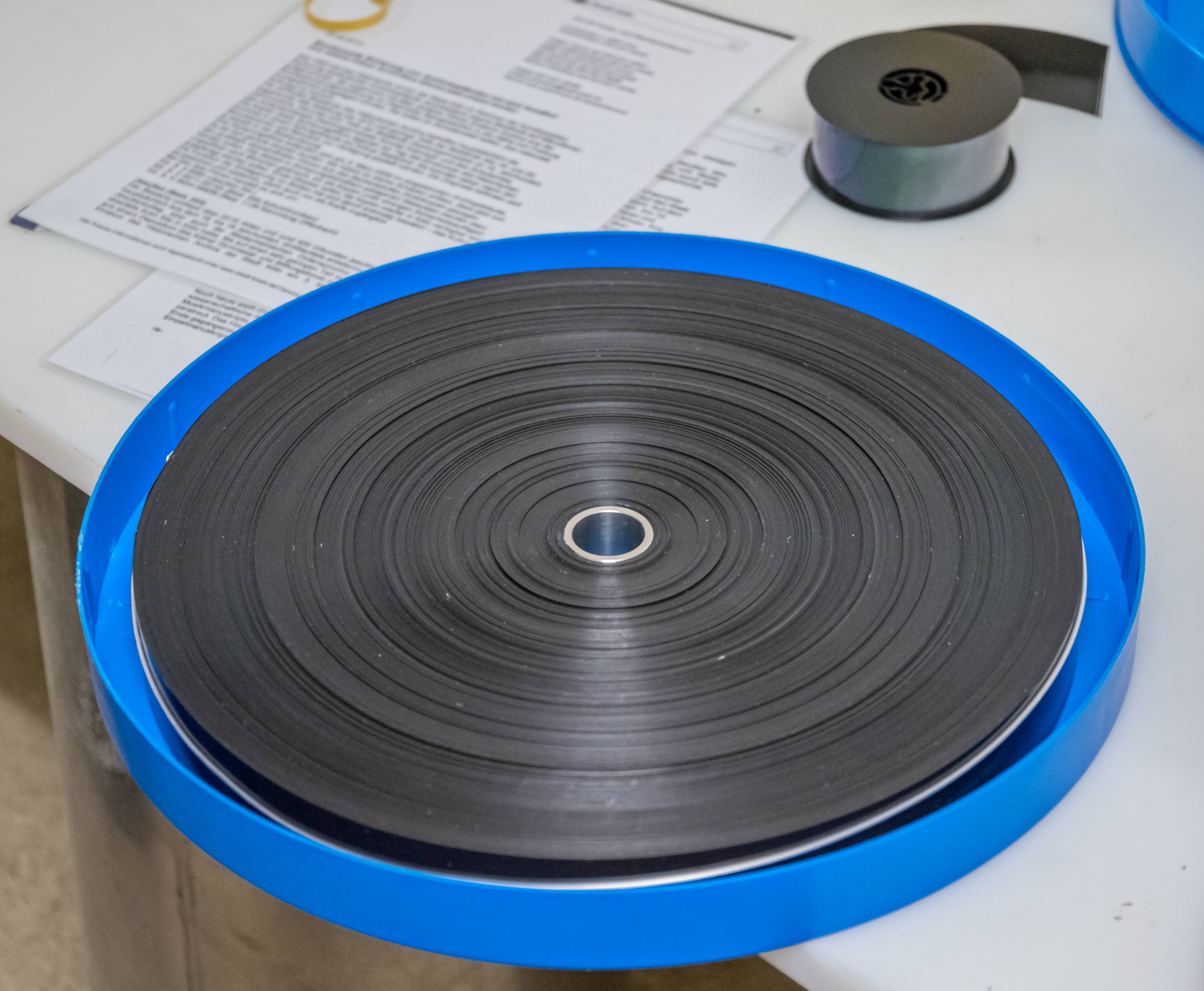 Der Barbarastollen ist der Zentrale Bergungsort der Bundesrepublik Deutschland zur Lagerung von fotografisch archivierten Dokumenten mit hoher national- oder kulturhistorischer Bedeutung. Er ist in Europa das größte Archiv zur Langzeitarchivierung. Die Bilder sind im Rahmen einer Führung des Bundesamts für Bevölkerungsschutz und Katastrophenhilfe (BBK) entstanden - Wikipedia Stammtisch,das 113. Treffen am 30. Mai 2016 Eine Filmrolle, wie sie in den Behältern Typ 2 eingelagert wird. Dies ist eine Demorolle- Original aber nicht einlagerungswürdig. Im Hintergrund ein Film aus dem diese Rollen zusammengesetzt werden